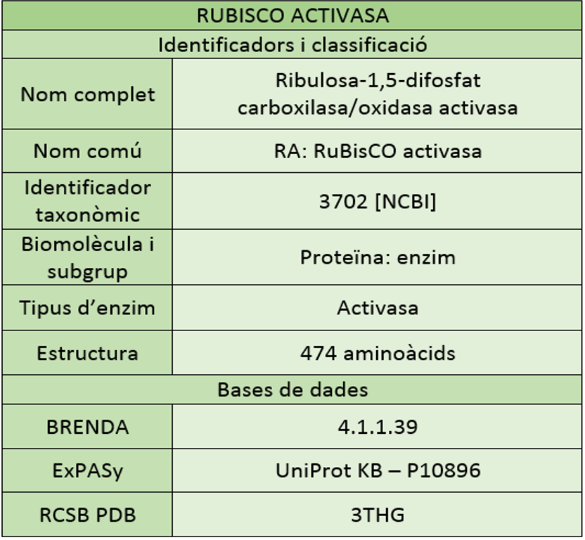 fitxa tècnica sencera